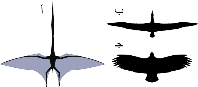 أشكال أجنحة الأزداركتيات. إعادة بناءٍ لأجنحة؛ أ الكويتزاكواتلس (شكلُ الجِناح مُشتقٌ من ‘الجناح الداكن’ رامفورينكوس)؛ ب، أجنحة القطرس الجَوَّال (Diomedea exulans)؛ جـ، وأجنحة كندور الأنديز (Vultur gryphus). مقاييس الأحجام ليست حقيقية.